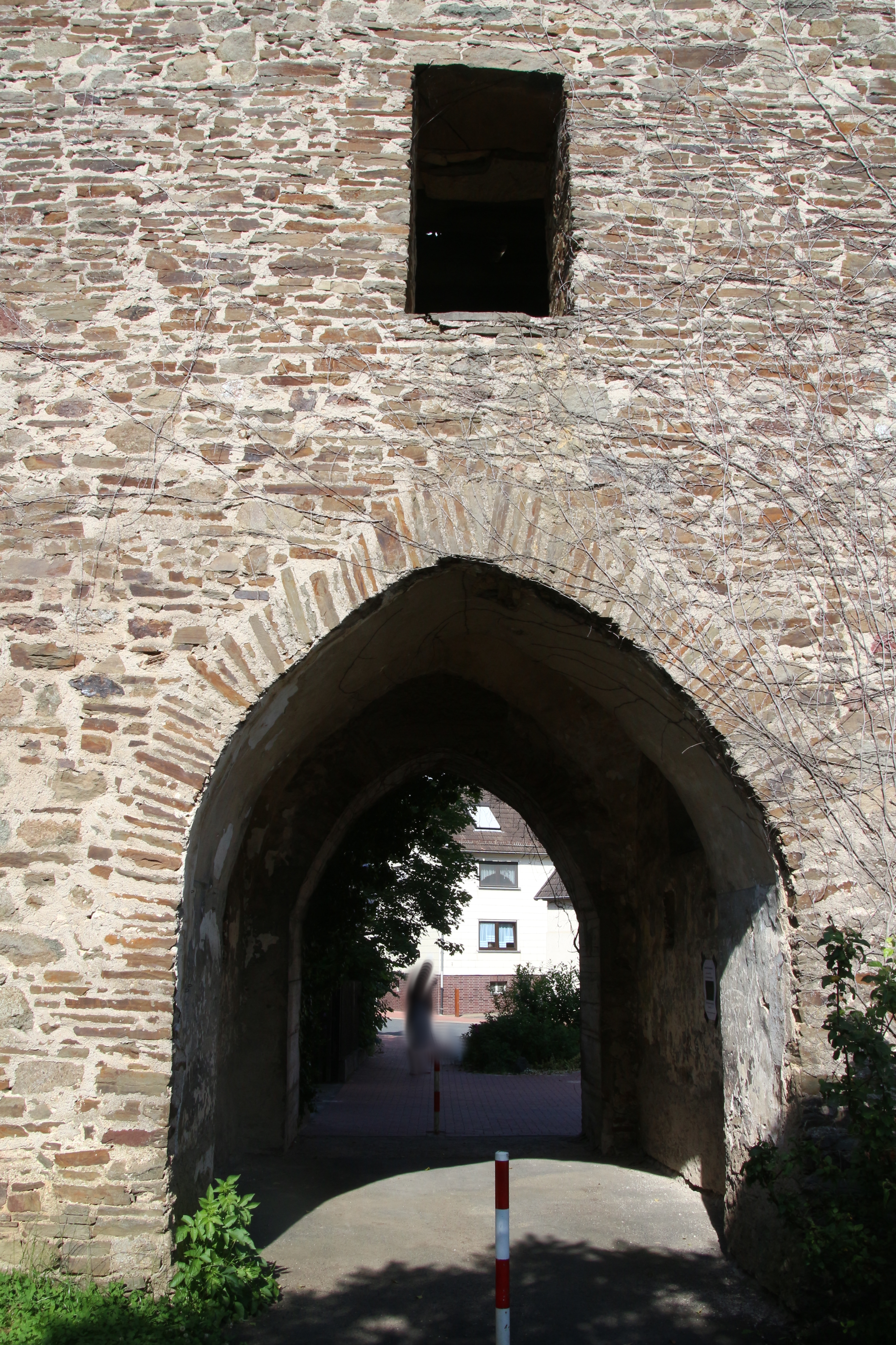 Siehe Bild und Dateiname